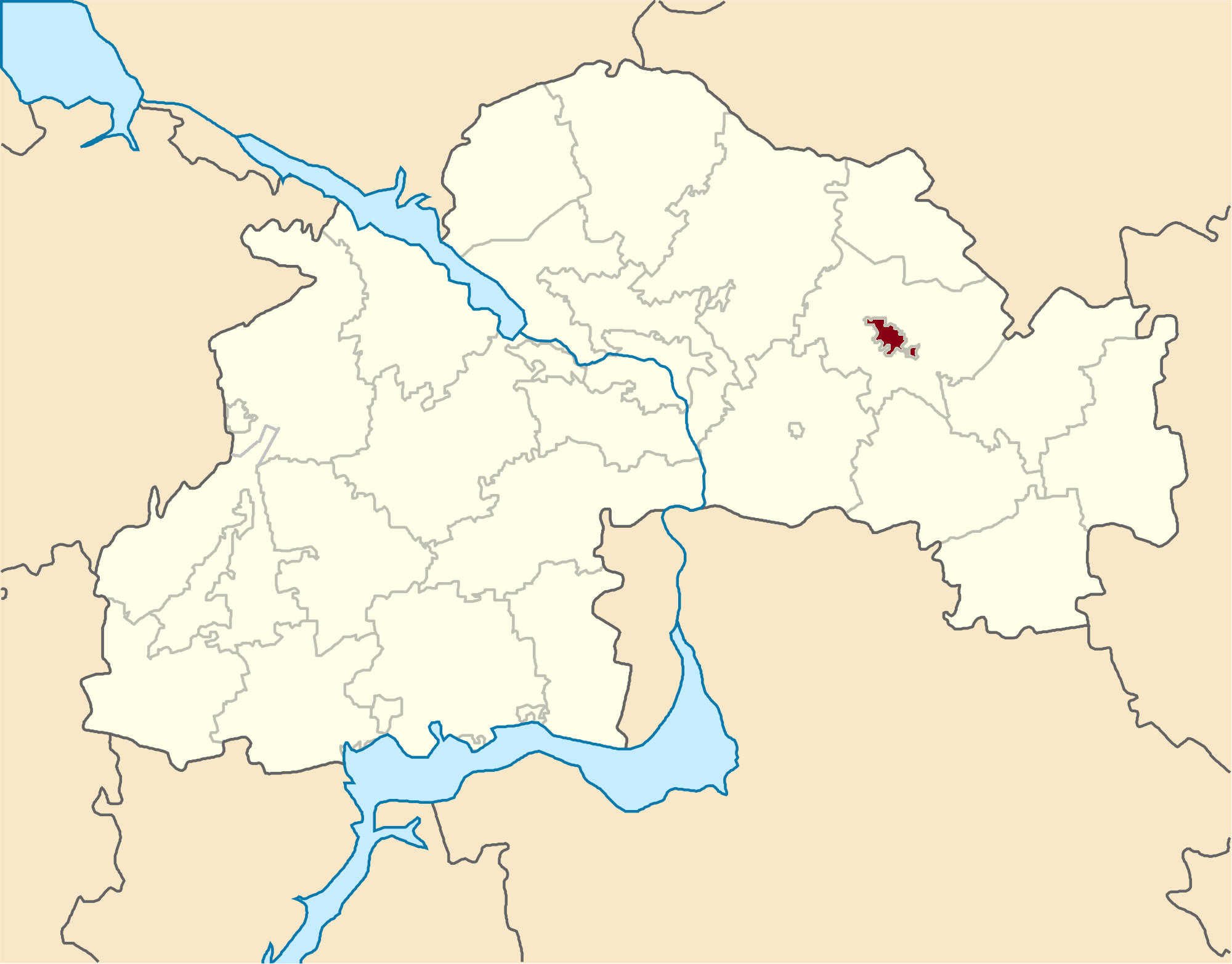 Pavlograd-Raion map